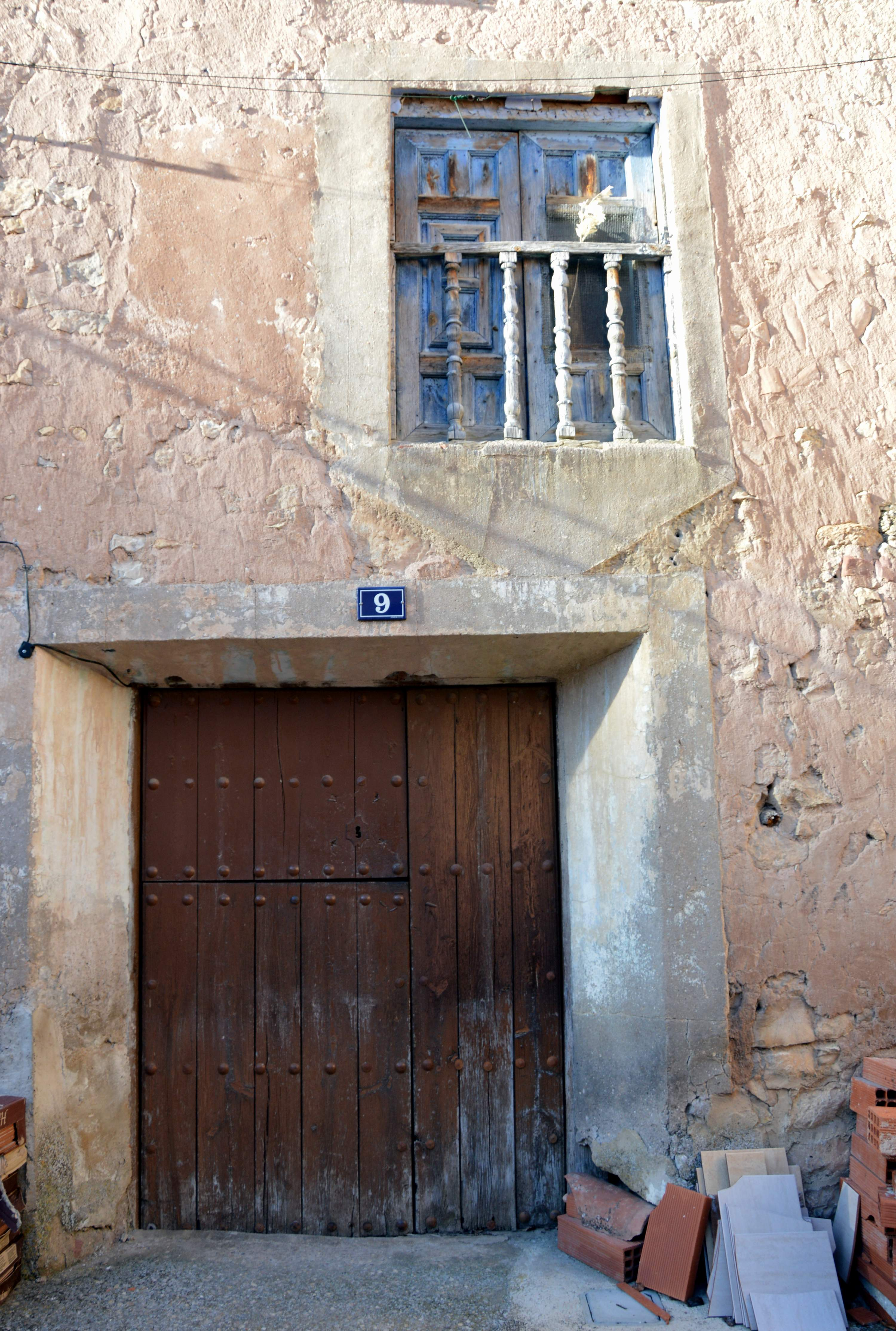 Detalle de entrada y ventana-balcón en la fachada de una casa de Tormón (Teruel), muestra de arquitectura vernácula (2017).